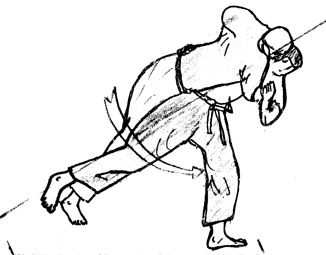 fauchage_hanche_naban.jpg